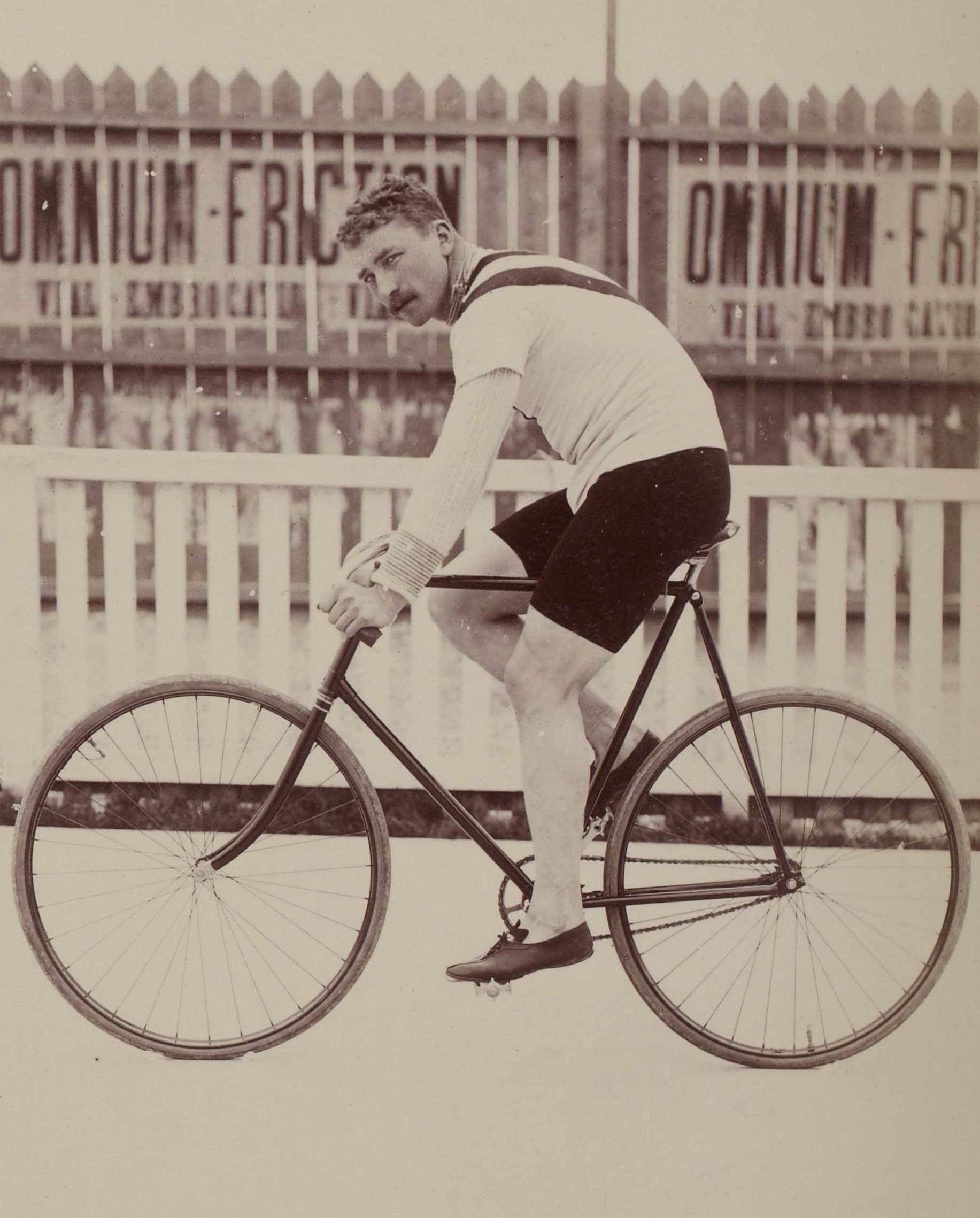 [Collection Jules Beau. Photographie sportive] : T. 3. Année 1896 / Jules Beau : Jaap Eden, Hollandais